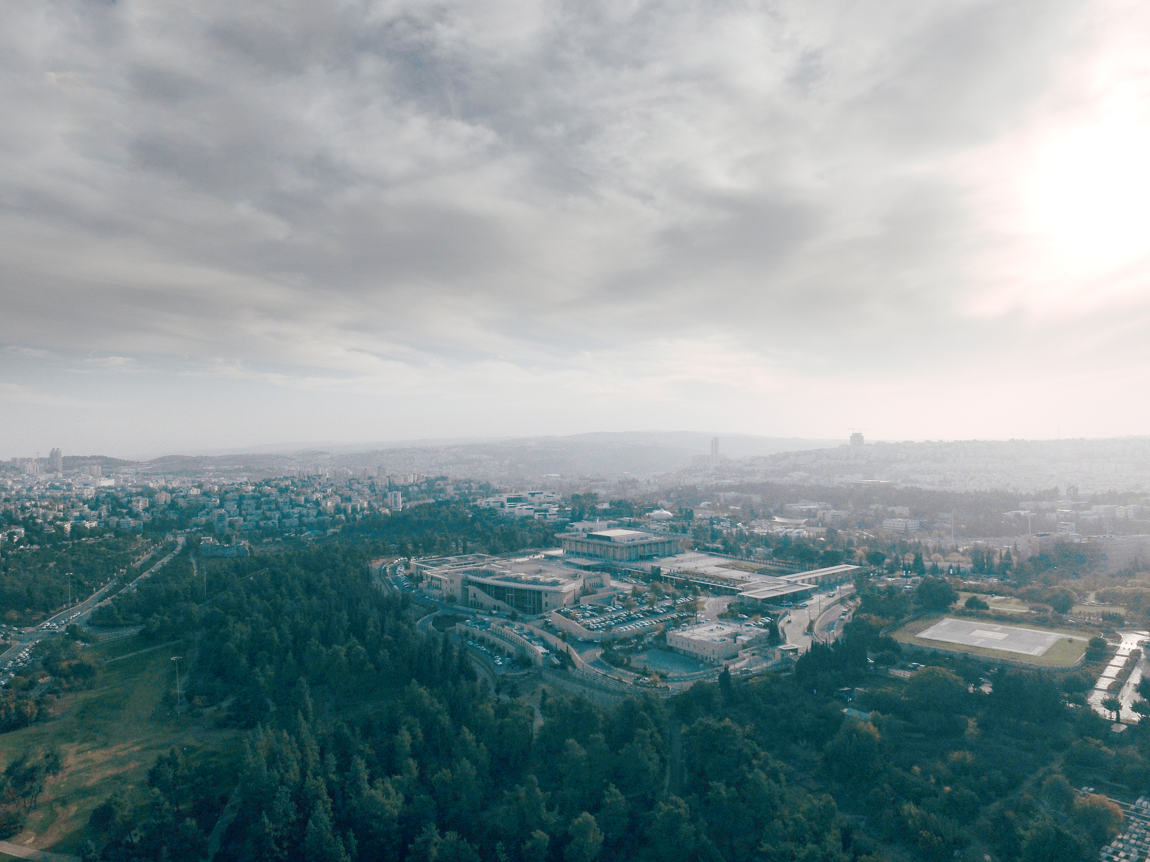 הכנסת 2017